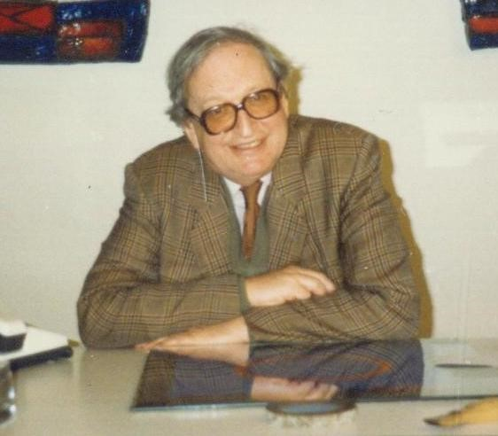 Roger Boss à son bureau du Conservatoire de Neuchâtel en 1987